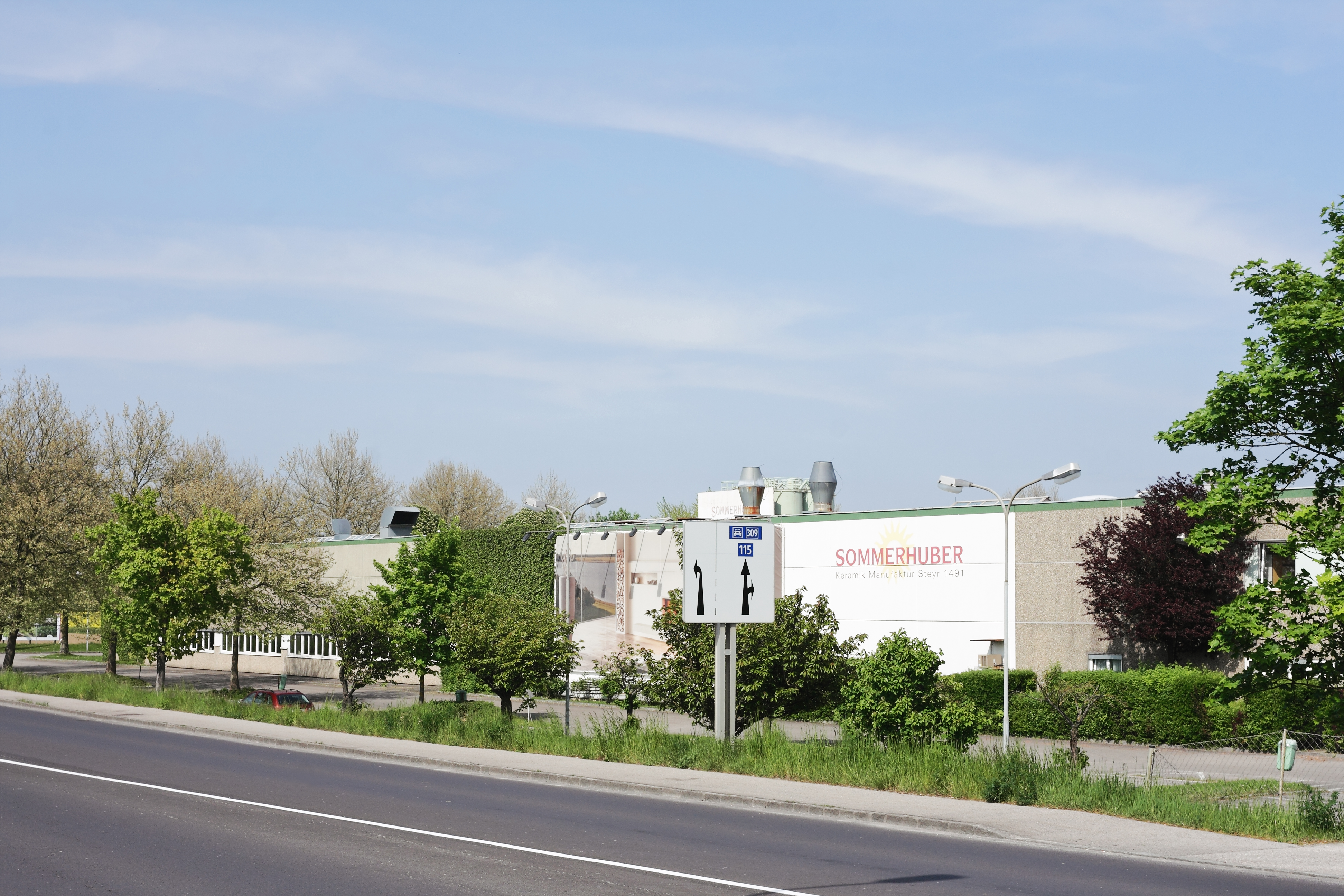 Das Unternehmen Sommerhuber in Steyr, Resthofstraße 69. Blick von der Ennser Straße